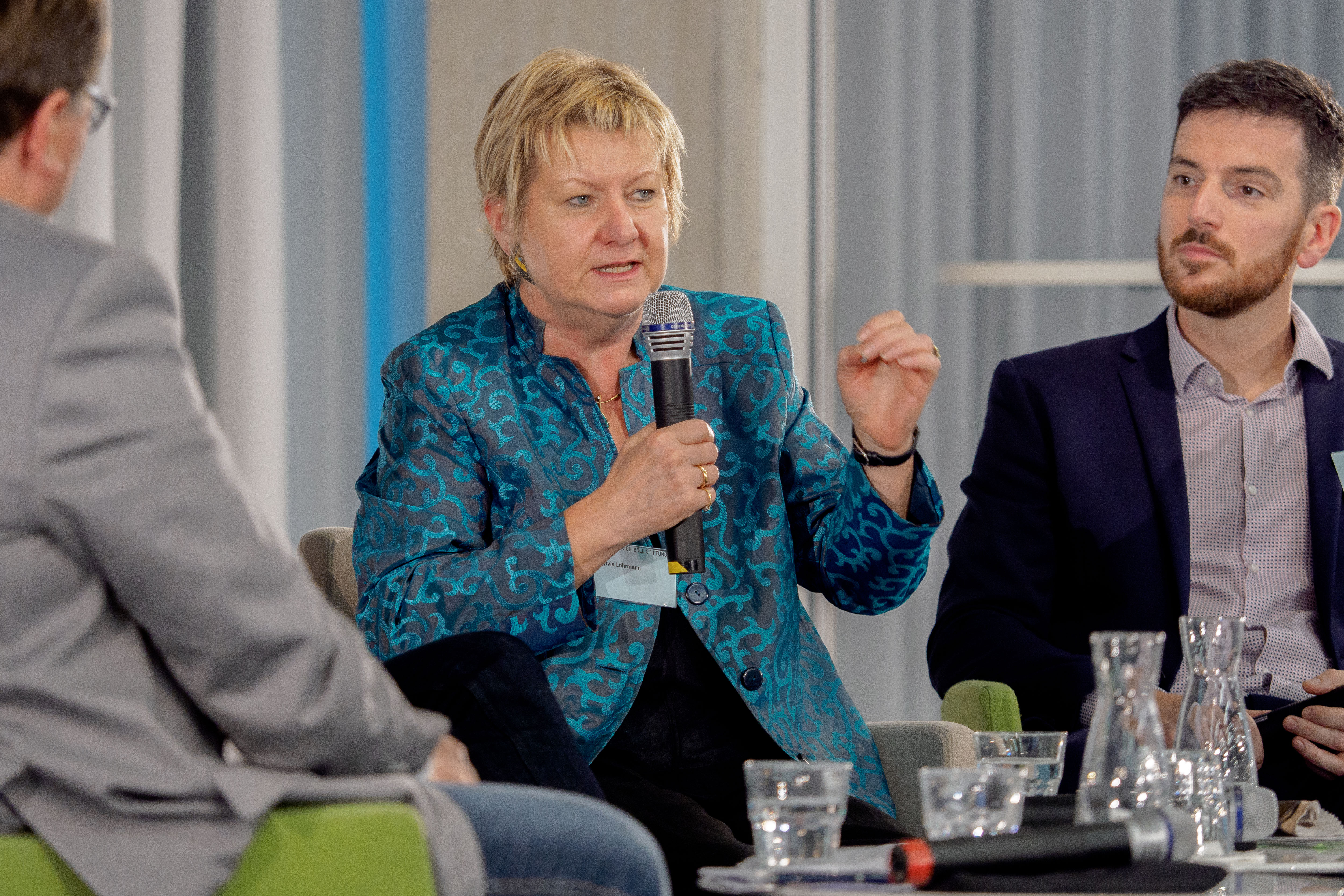 Sylvia Löhrmann (Ministerin f. Schule und Weiterbildung NRW 2010-2017) bei einer Podiumsdiskussion in der Heinrich-Böll-Stiftung